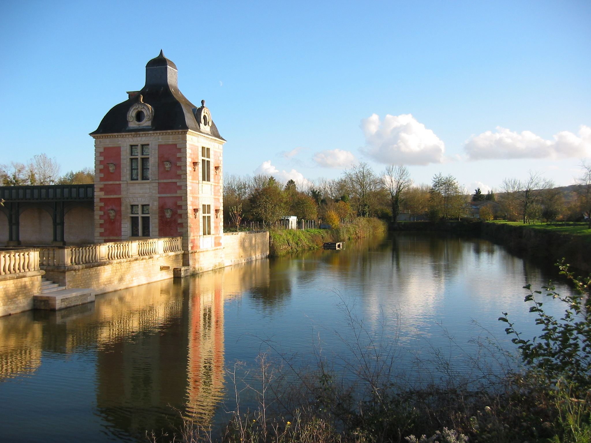 Eckpavillon der Orangerie von La Mothe-Saint-Héray